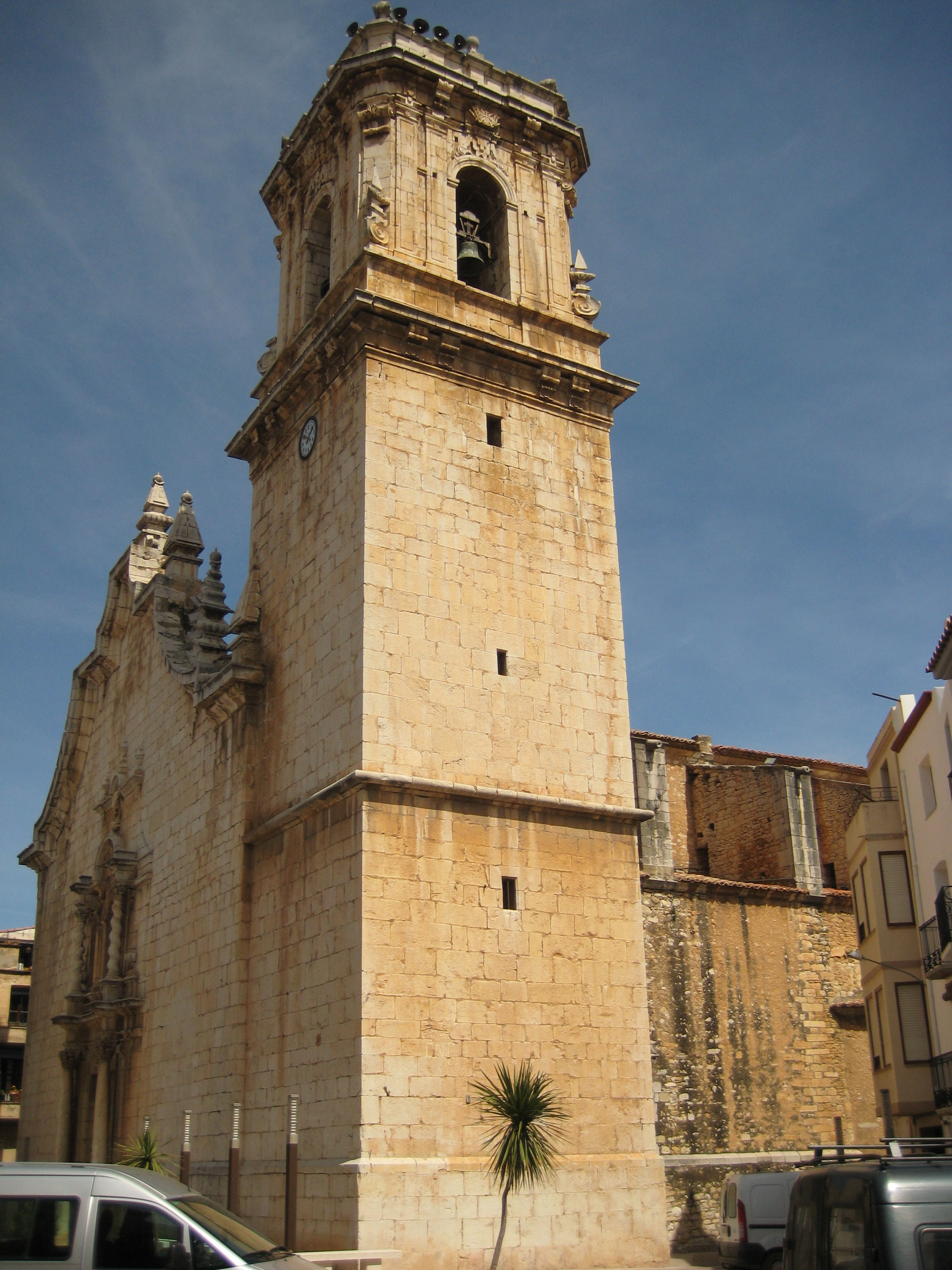 Torre campanar de l'església de Sant Bartomeu de la Jana (Baix Maestrat)